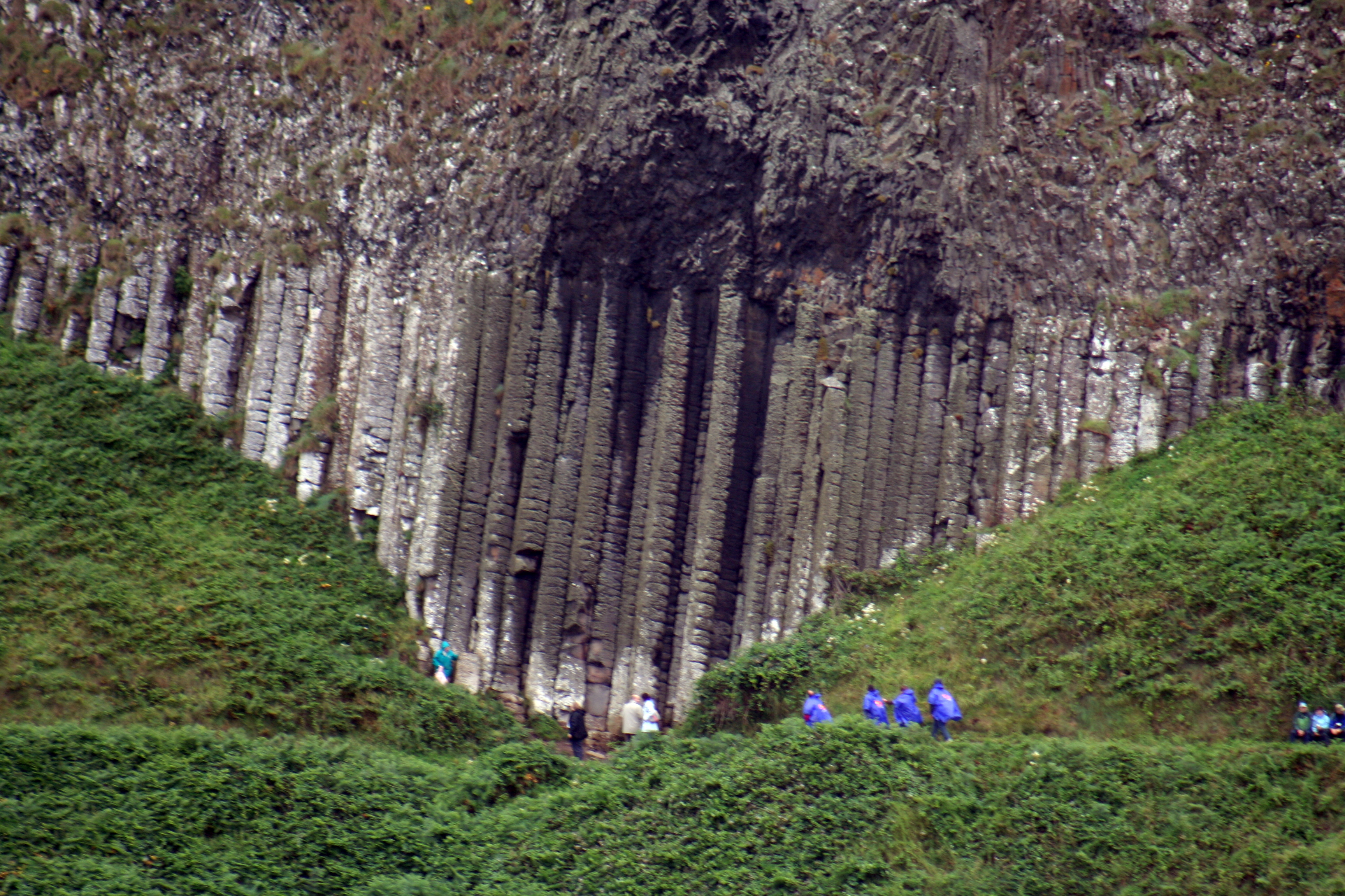 Calzada de los gigantes (Giant´s causeway) condado de Atrim. The Organ